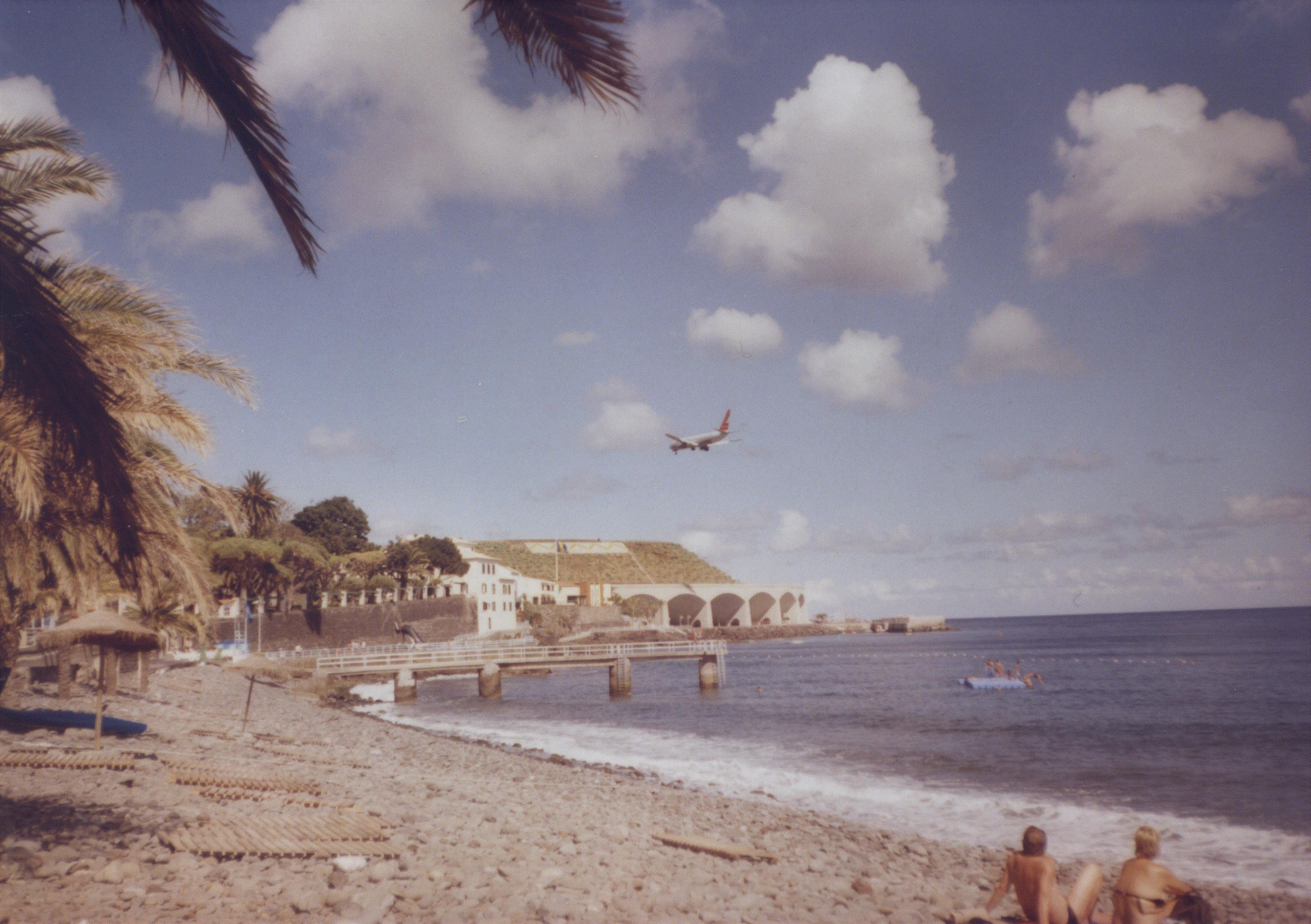 městská pláž v Santa Cruz